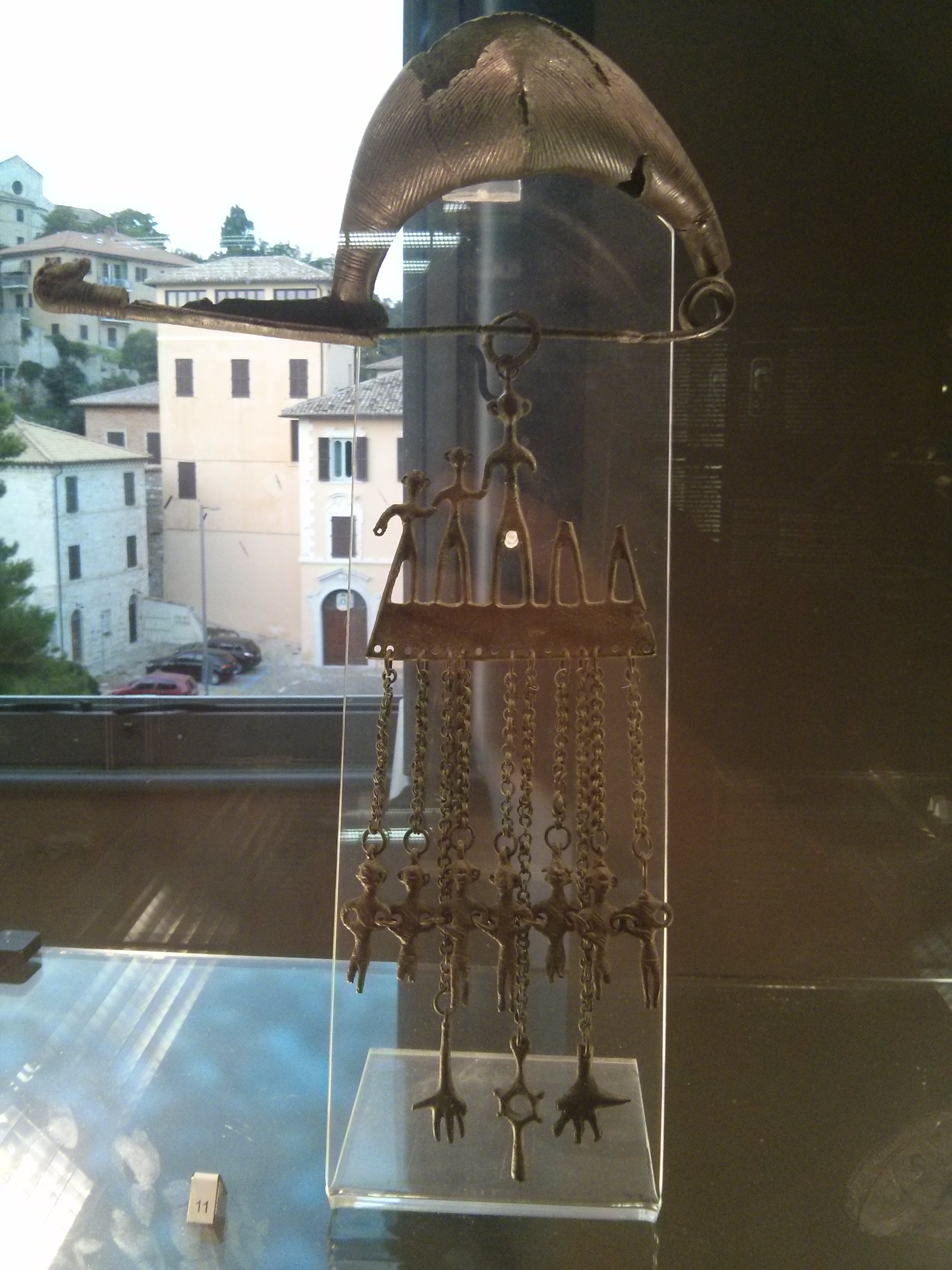 Museo Archeologico Nazionale delle Marche - MIBAC This is a photo of a monument which is part of cultural heritage of Italy.